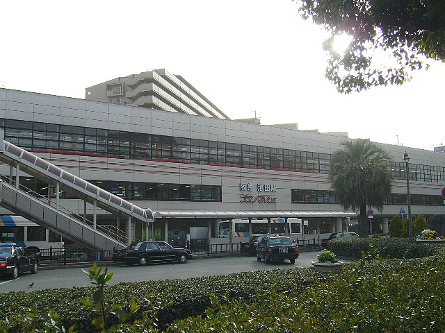 阪急電鉄 池田駅 駅舎（北口）